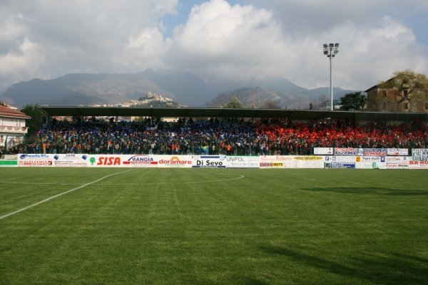 calcio